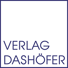 Logo des Verlag Dashöfer, Hamburg